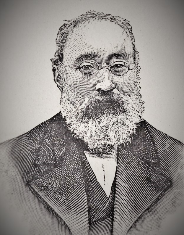 Collection de portraits Réf. image : CIPA0305 Gombault s.d. Cote : CIPA0305 Technique : Gravure - Bois